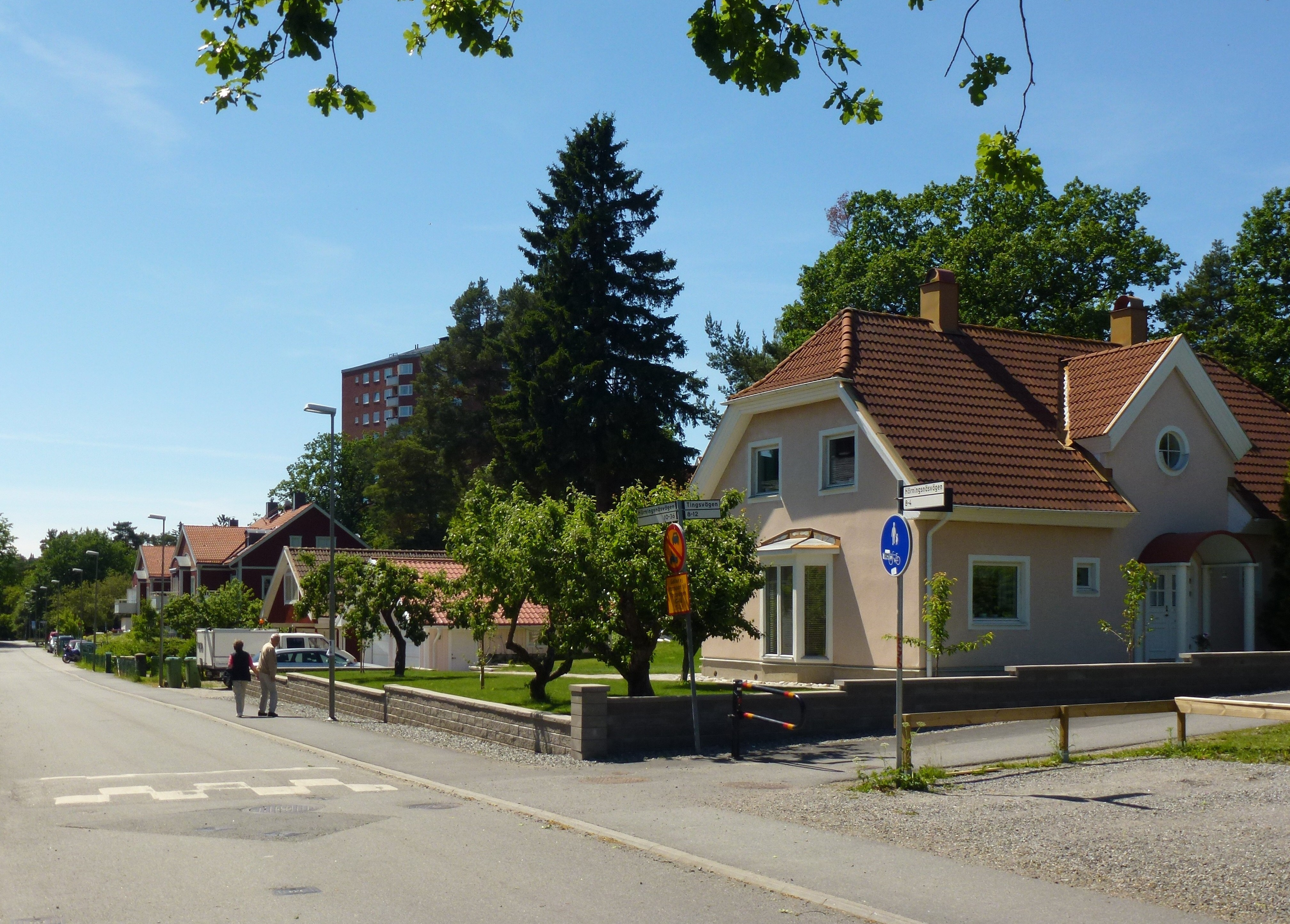 Hörningsnäsvägen